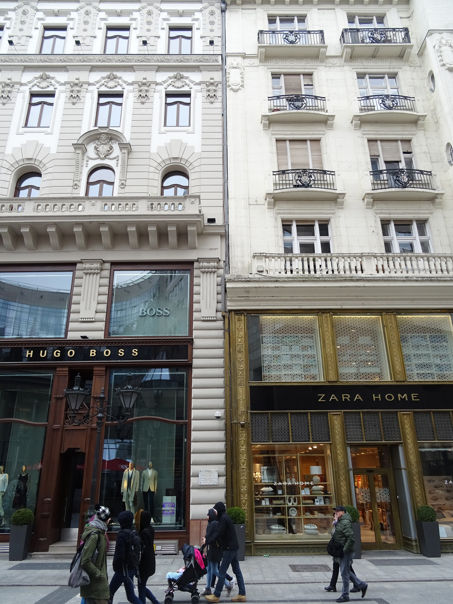 E házban élt Elek Ilona, vívó, (1907-1988) az első magyar olimiai bajnoknő. Olimpoao győzelmei: Berlin, 1936.: London, 1948. Magyar Olimpiai Bizottsag 2011